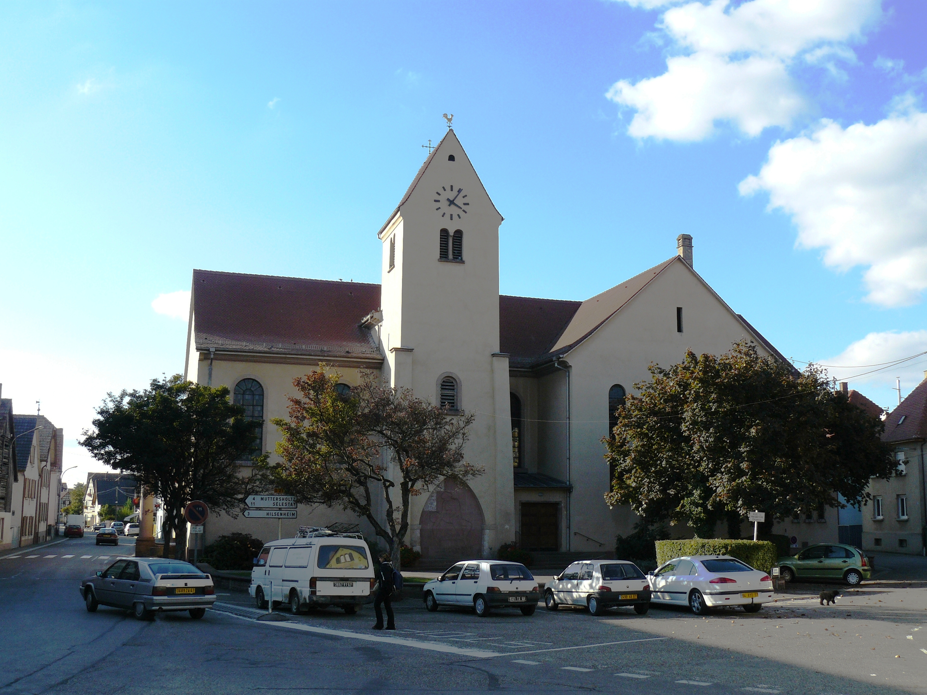 Église catholique Saint-Blaise